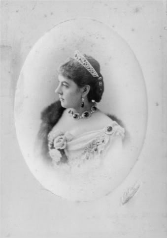 Зинаида Дмитриевна Скобелева (1856-1899), младшая дочь Ольги и Дмитрия Скобелевых. С 1878 года графиня Богарнэ, герцогиня Лейхтенбергская с 1889 года.